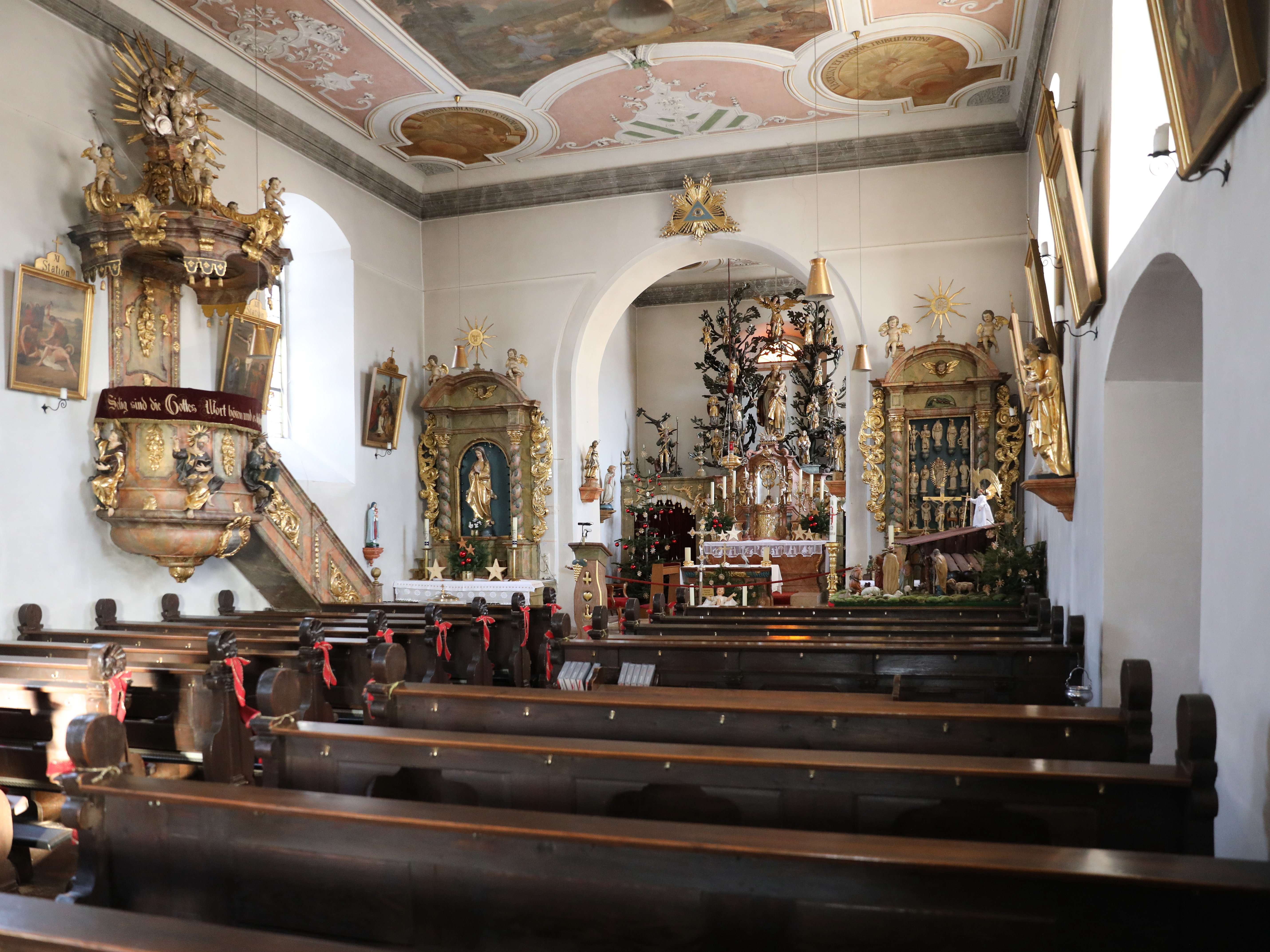 katholische Wallfahrtskirche Maria, Königin der Märtyrer und der vierzehn heiligen Nothelfer; Haßlach